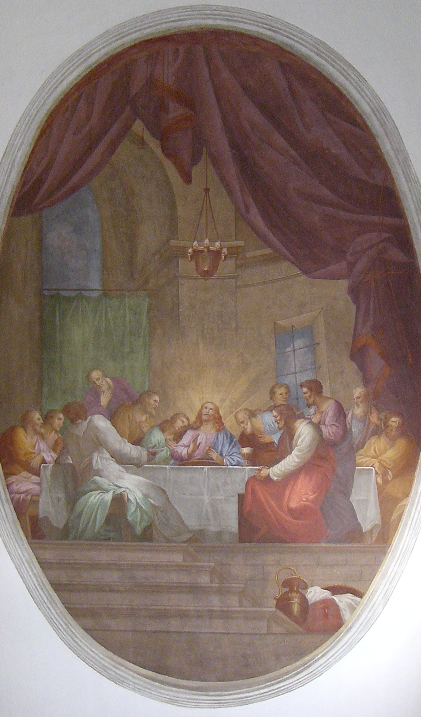 Deckenfresko mit dem letzten Abendmahl von Alois Keller in der Pfarrkirche von Emmenhausen